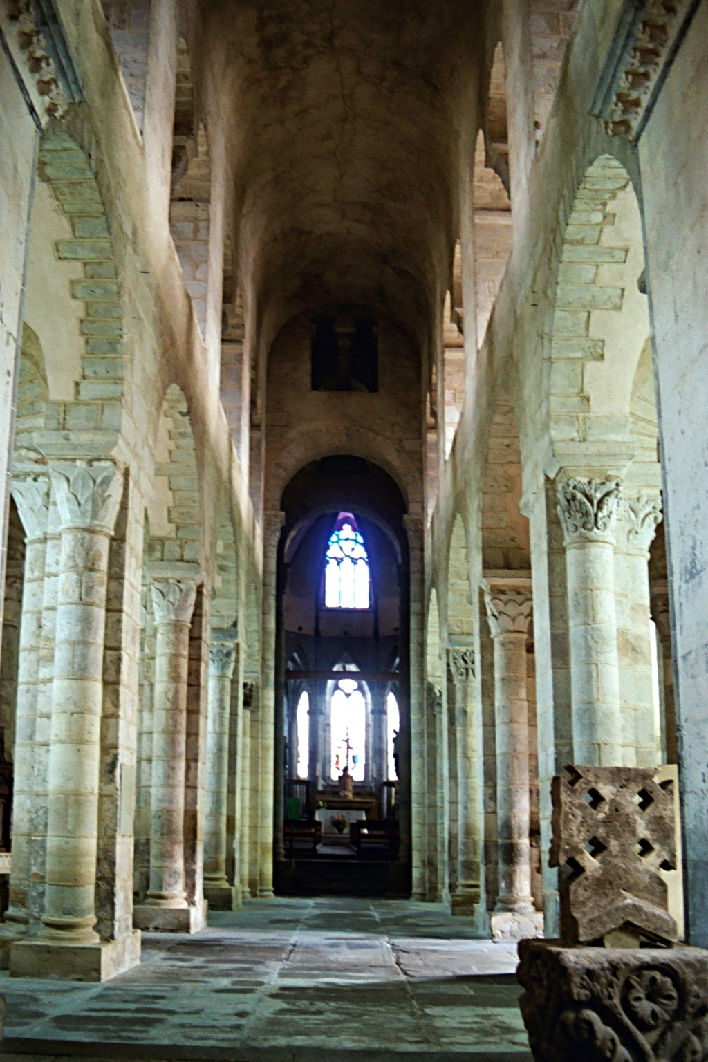 France - Auvergne - Collégiale Saint-Victor et Sainte-Couronne d'Ennezat